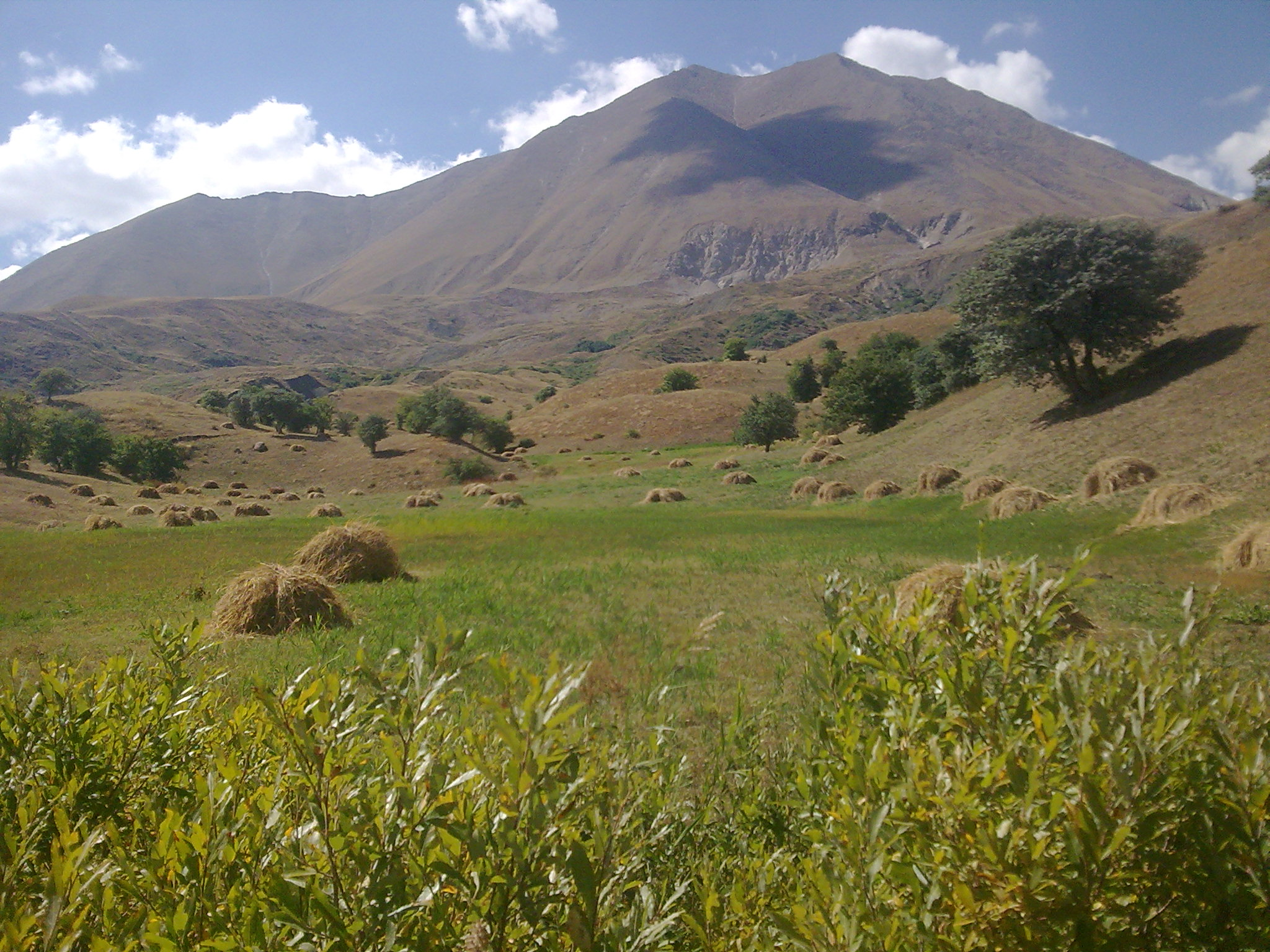 Kurdî: Dema çandinê Qopiza Jorîn